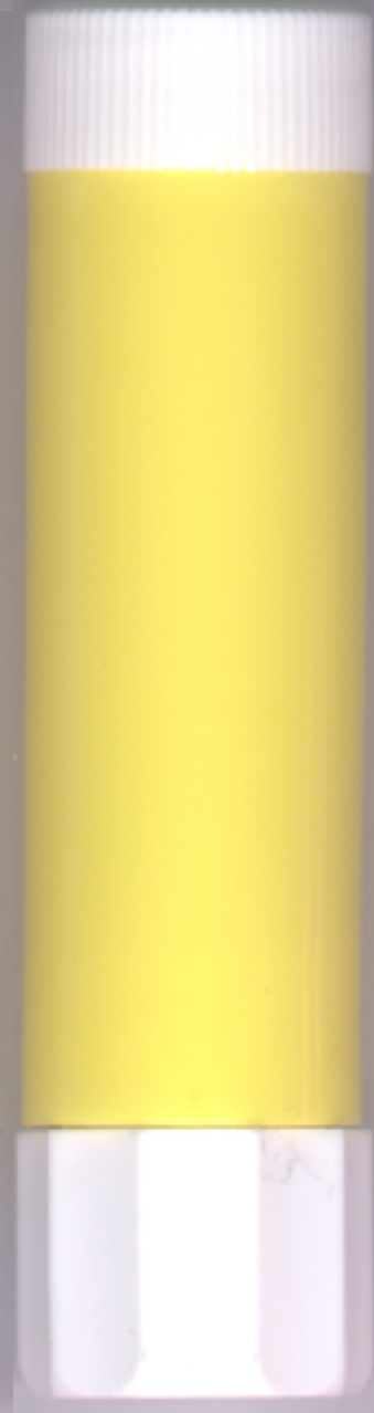 tube de colle jaune Photo personnelle.